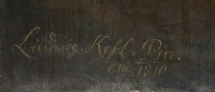 signatura malíře Ludvíka Kohla (1749-1821)